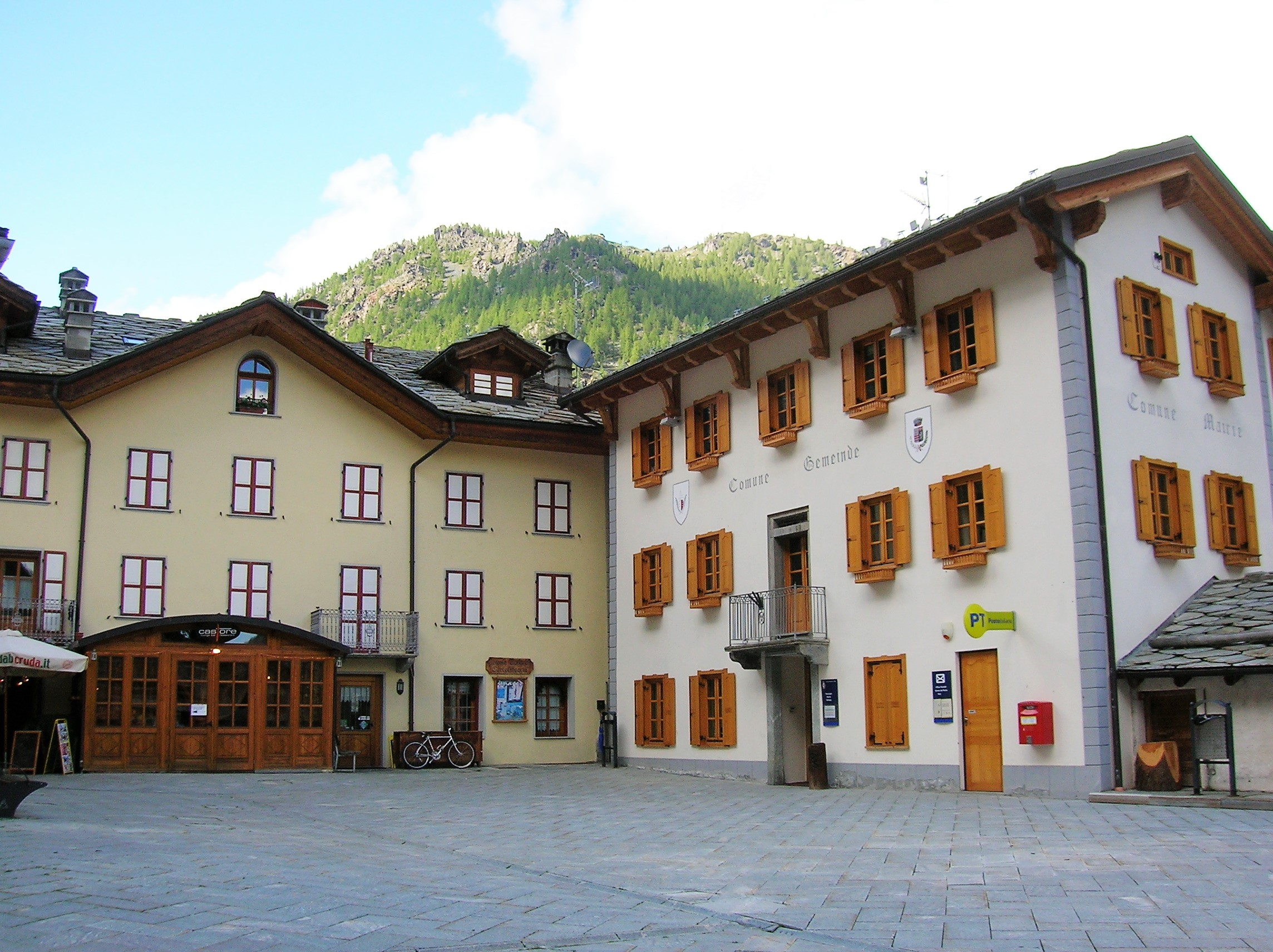 Municipio Gressoney-La-Trinité, Valle d'Aosta, Italia.